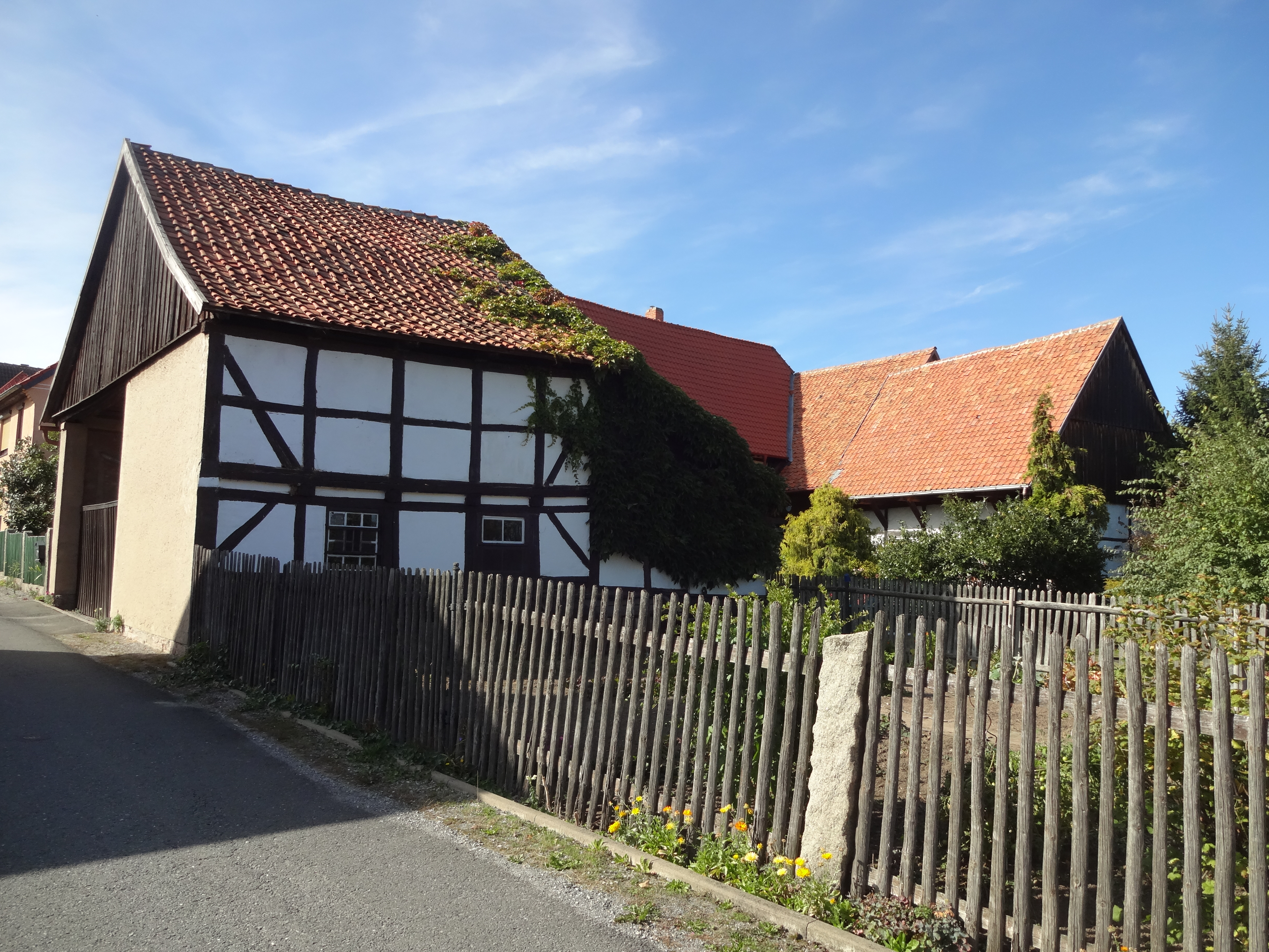 denkmalgeschützter Bauernhof in der Schmiedestraße 3 in Drübeck